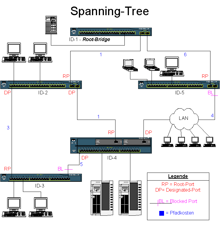 Ein Beispiel für Spanning-Tree in einem geswitchten Ethernet